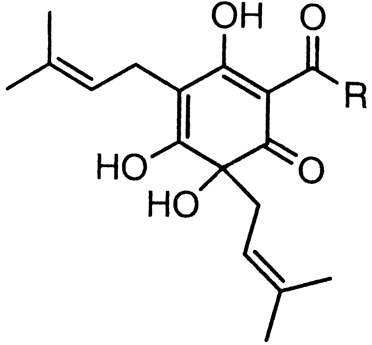 Grundstruktur for alfasyrer (homuloner)